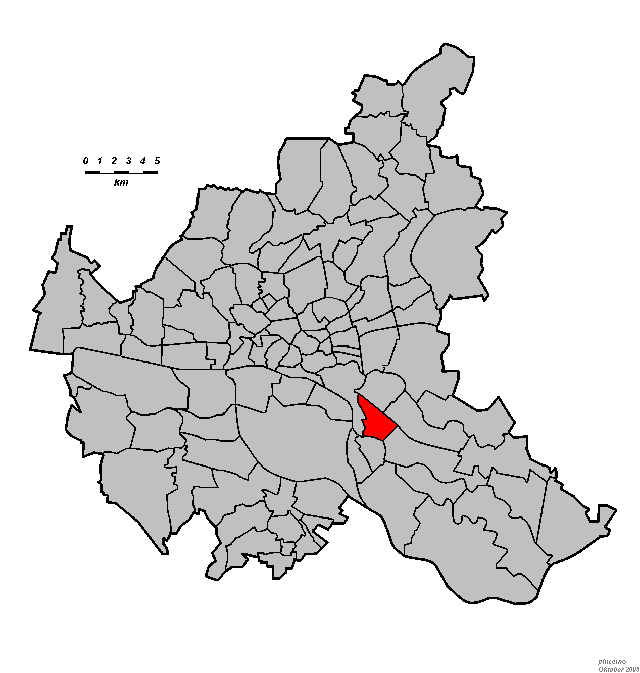 Hamburg, Stadtteil Moorfleet